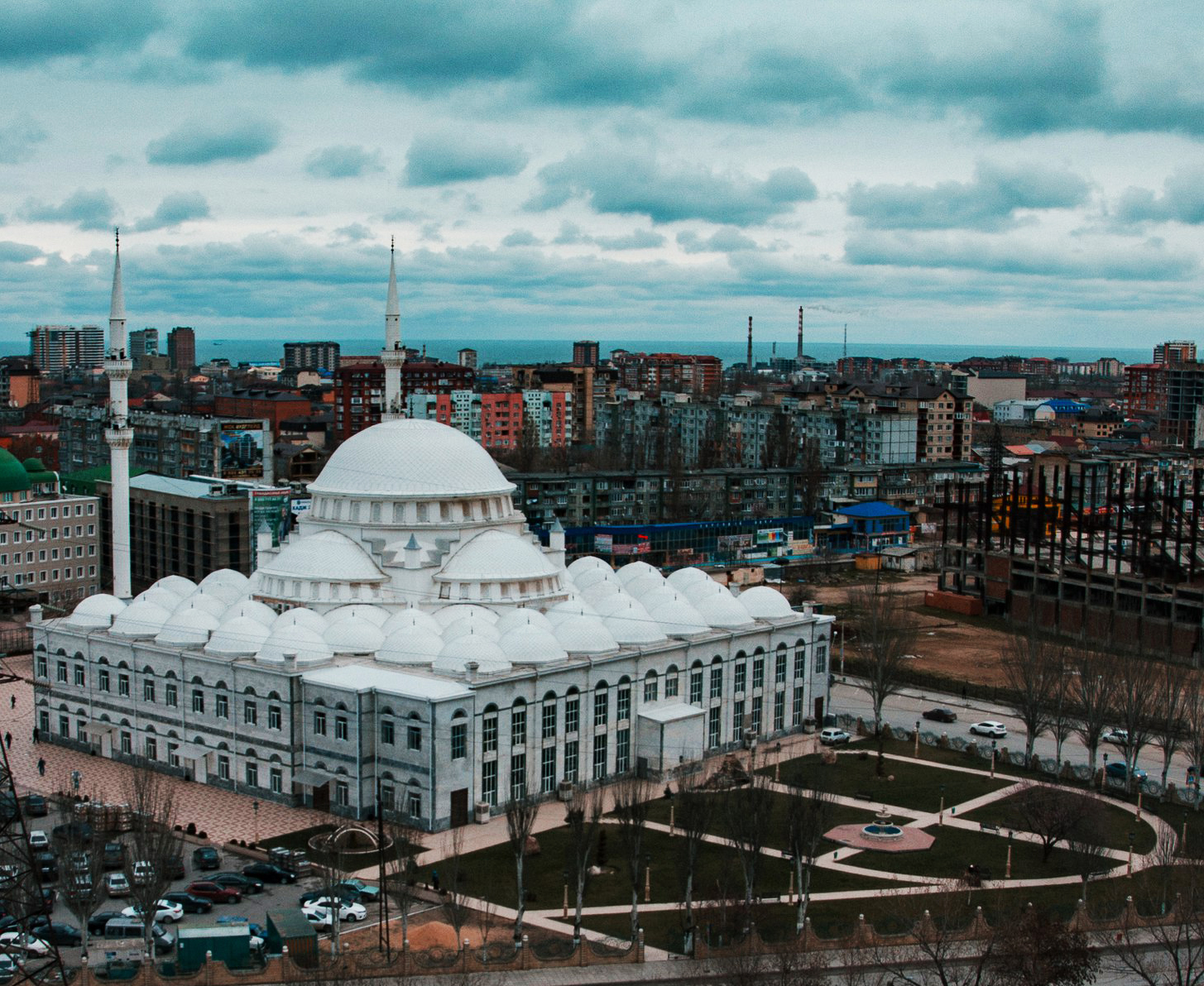 Джума мечеть Махачкалы